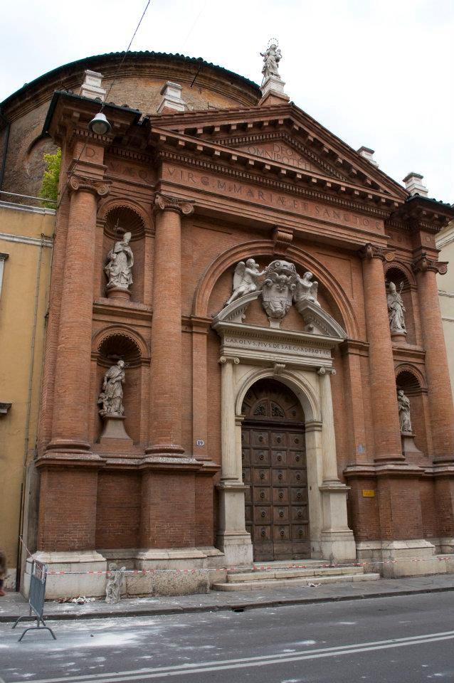 Immagine raccolta sul web: diritti riservati al legittimo proprietario